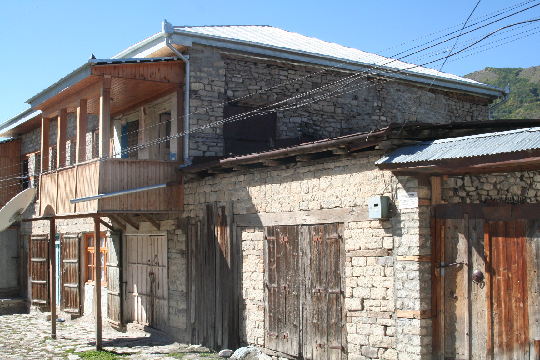 House of Haji Samad Shirinov in Lahij. Built in 1865.